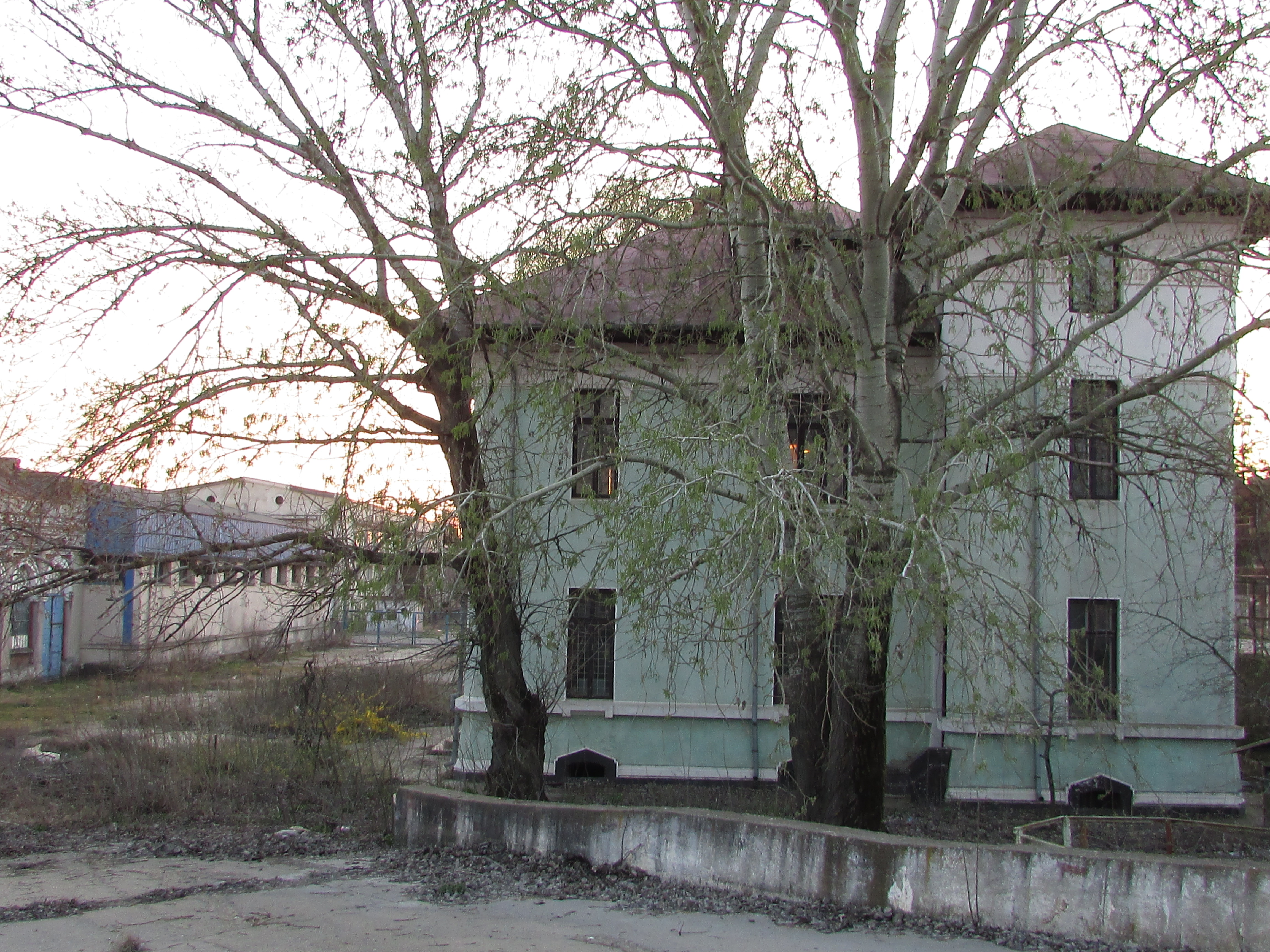 Administrația Șantierului Naval Giurgiu 02